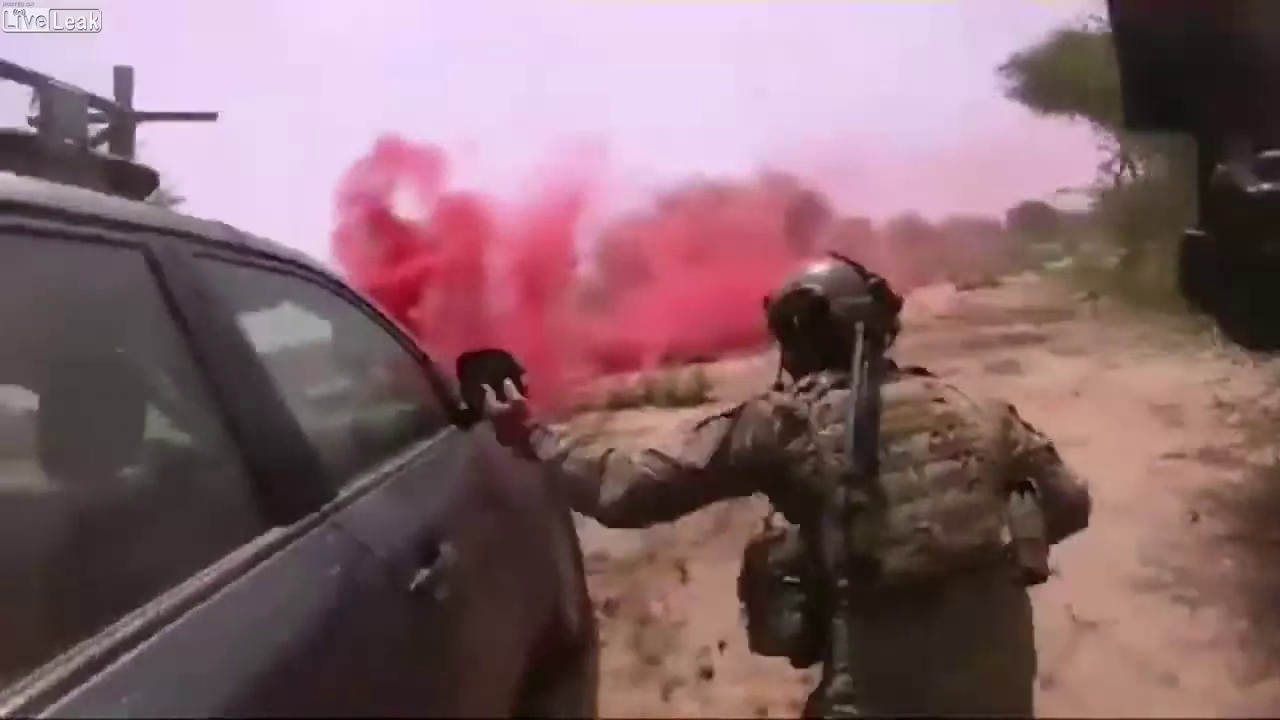 Sgt. La David Johnson, an U.S. special force soldier during the Tongo Tongo ambush. Screenshot from a video taken by a fallen US soldier.